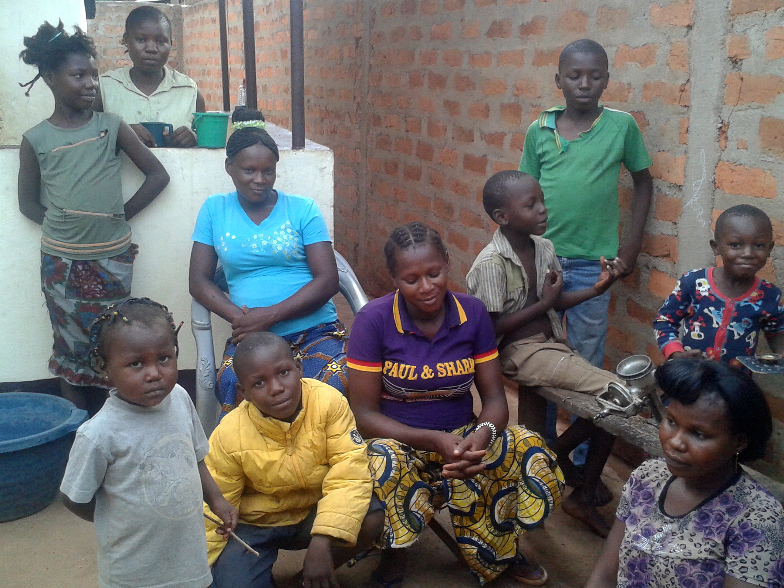 Famille centrafricaine toujours ensemble This is an image of Cultural Fashion or Adornment from Central African Republic